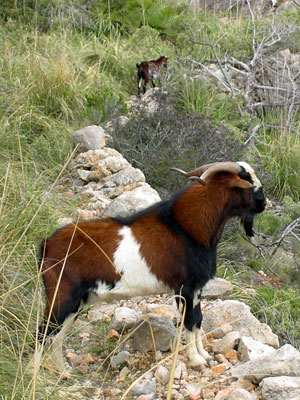 Verwilderter Hausziegen auf Mallorca